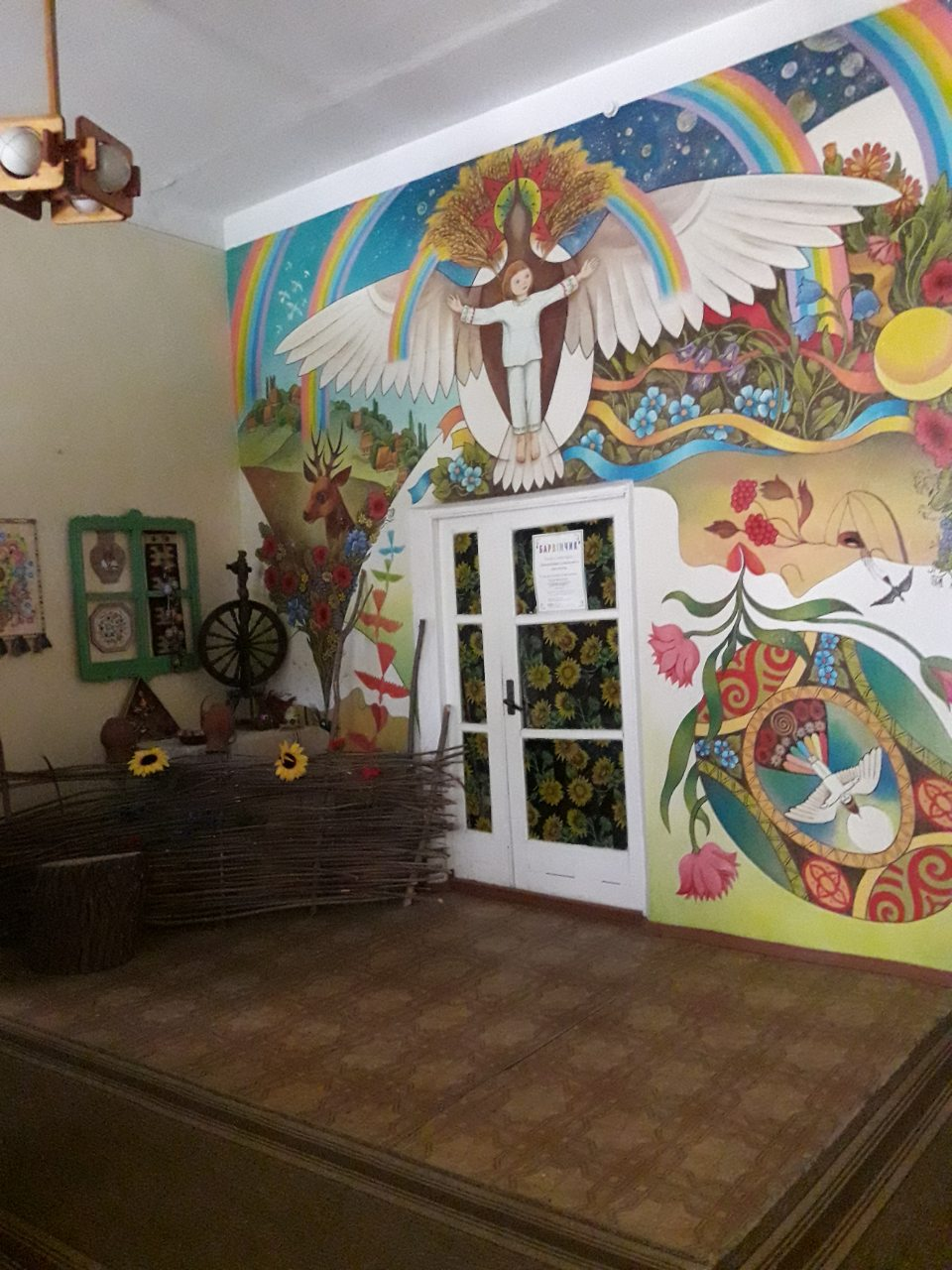 Хол бібліотеки-філії №2 Хмельницької міської ЦБС. червень 2019.